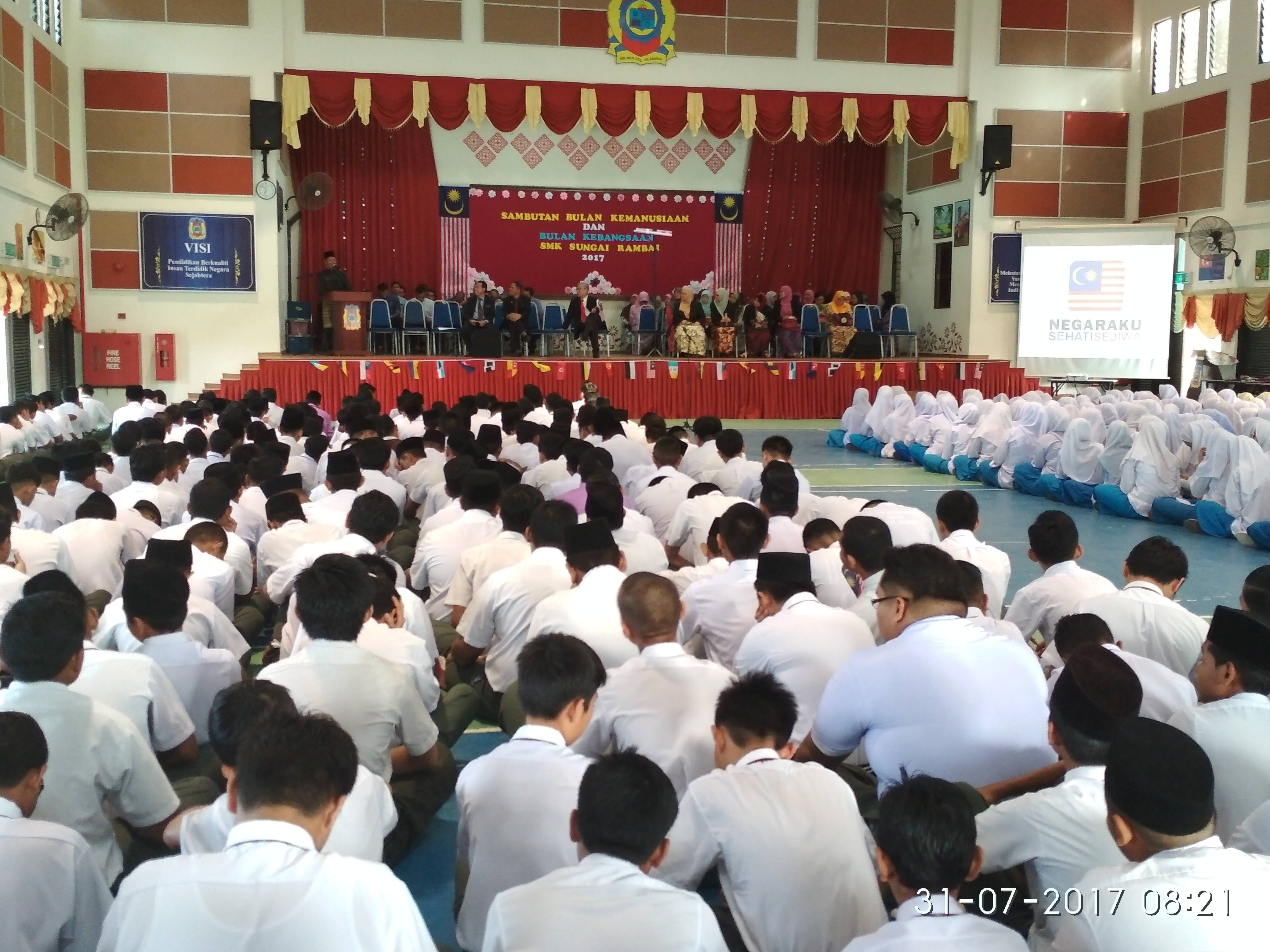 suasana dewan ketika majlis sambutan kemerdekaan